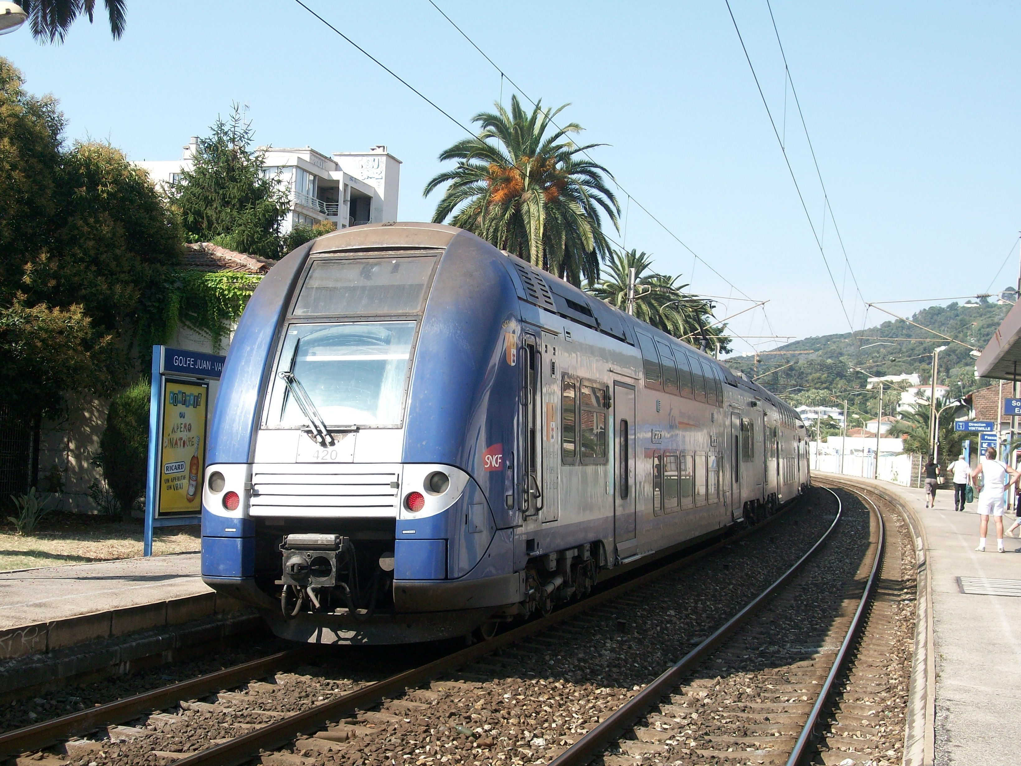 Z 26500 sur un TER PACA